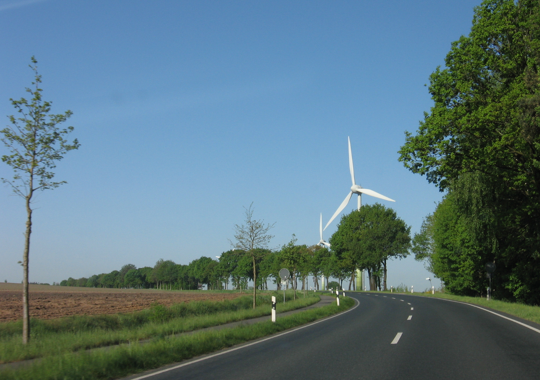 Bundesstraße 71, bij Bremervörde